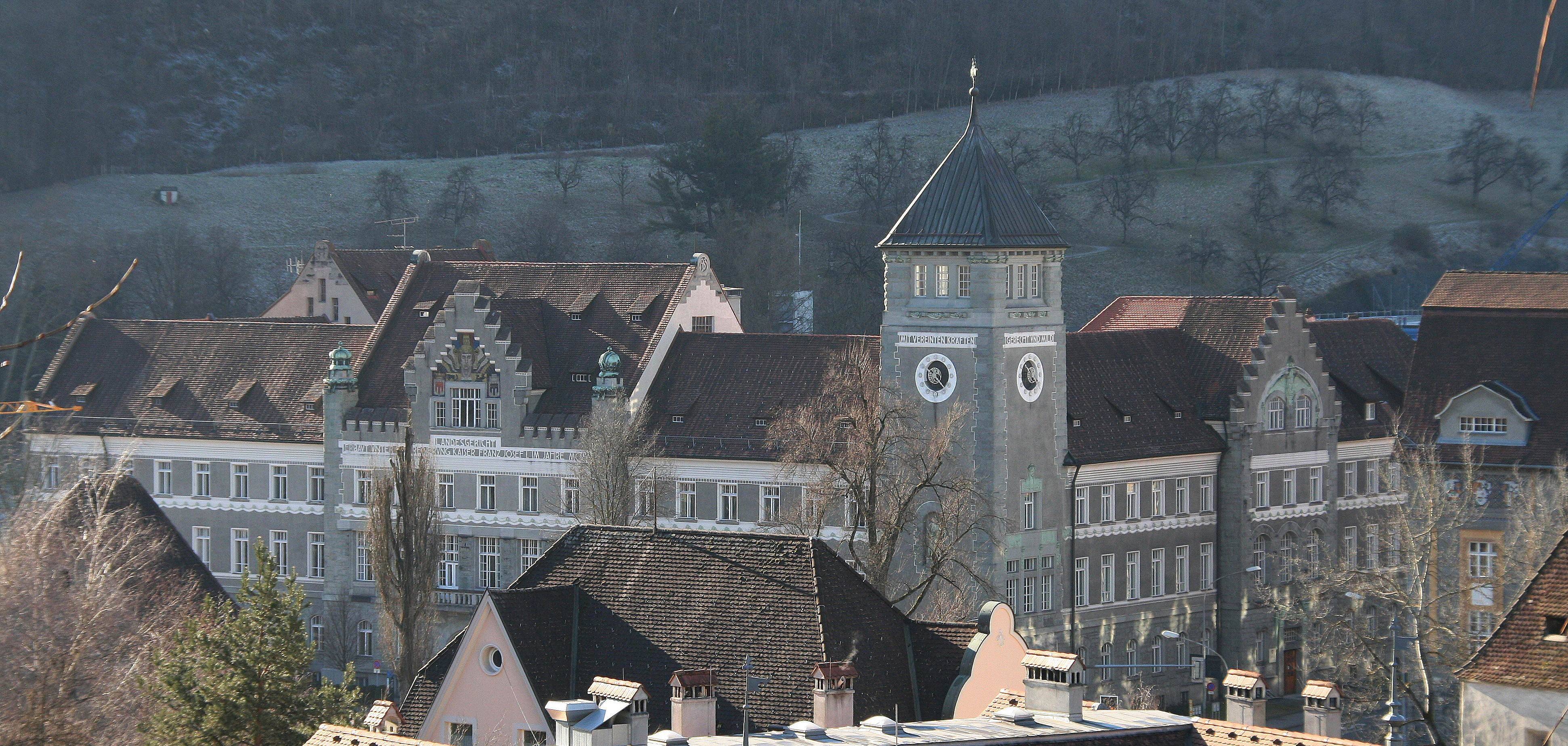 Blick von der Ardetzenbergstrasse auf das Landesgericht für Vorarlberg, Schillerstrasse 1 in Feldkirch. Architekt: Ernst Dittrich Baujahr 1903/05 Jugendstil - Blick von der Schillerstrasse